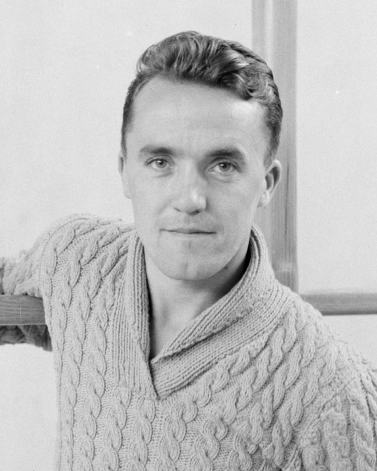 Warschau. Centraal Instituut voor Lichamelijke Oefening: portret van de docent en Pools skikampioen Bronisław Czech